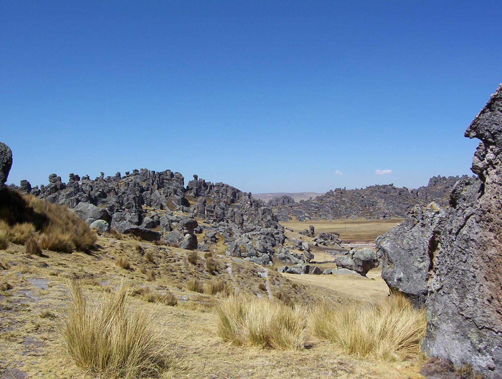 Bosque de Piedas Reserva Nacional de Huayllay - Pasco, Peru